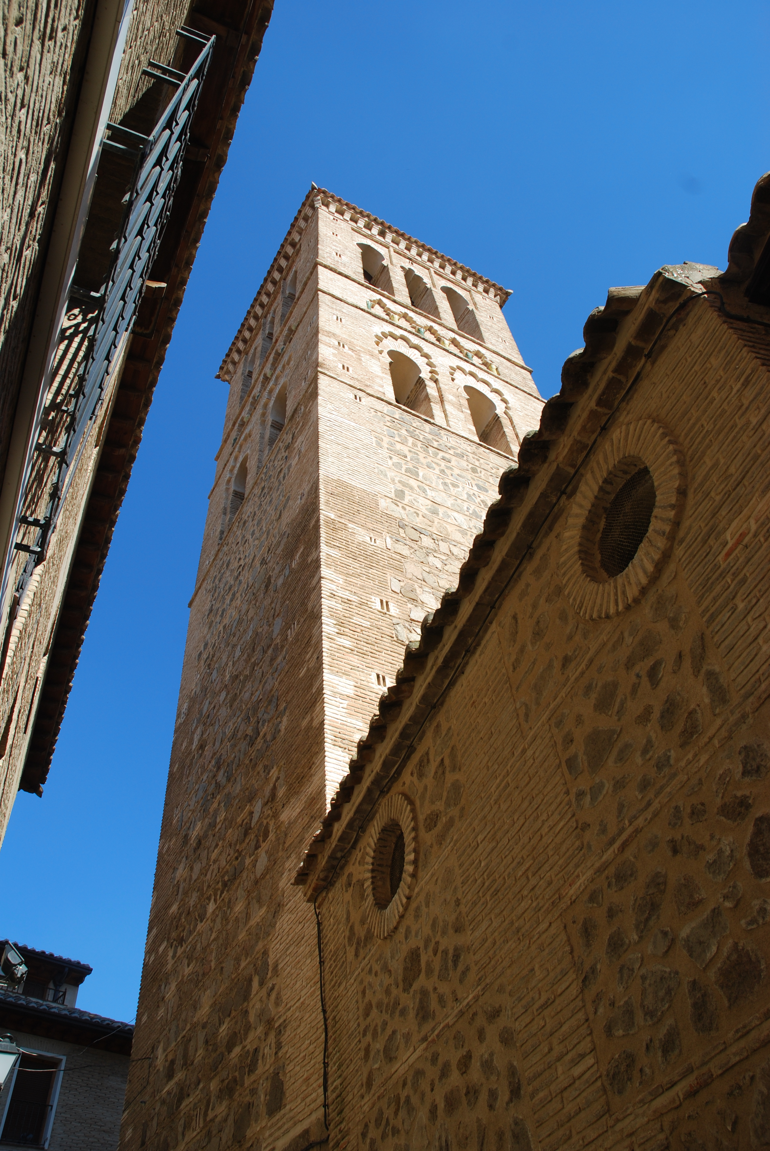 Iglesia de Santo Tomé, Toledo Igreja de Santo Tomé, Toledo Igrexa de Santo Tomé, Toledo